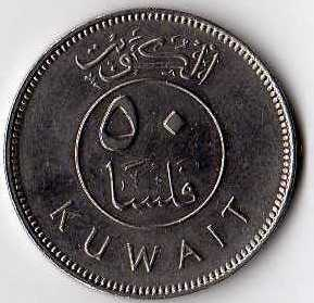 50 kuwejckich filsów - awers